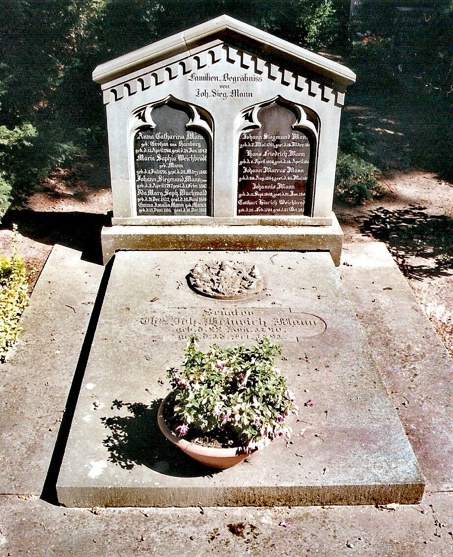 Lübecker Burgtorfriedhof; Erbbegräbnis der Familie Mann